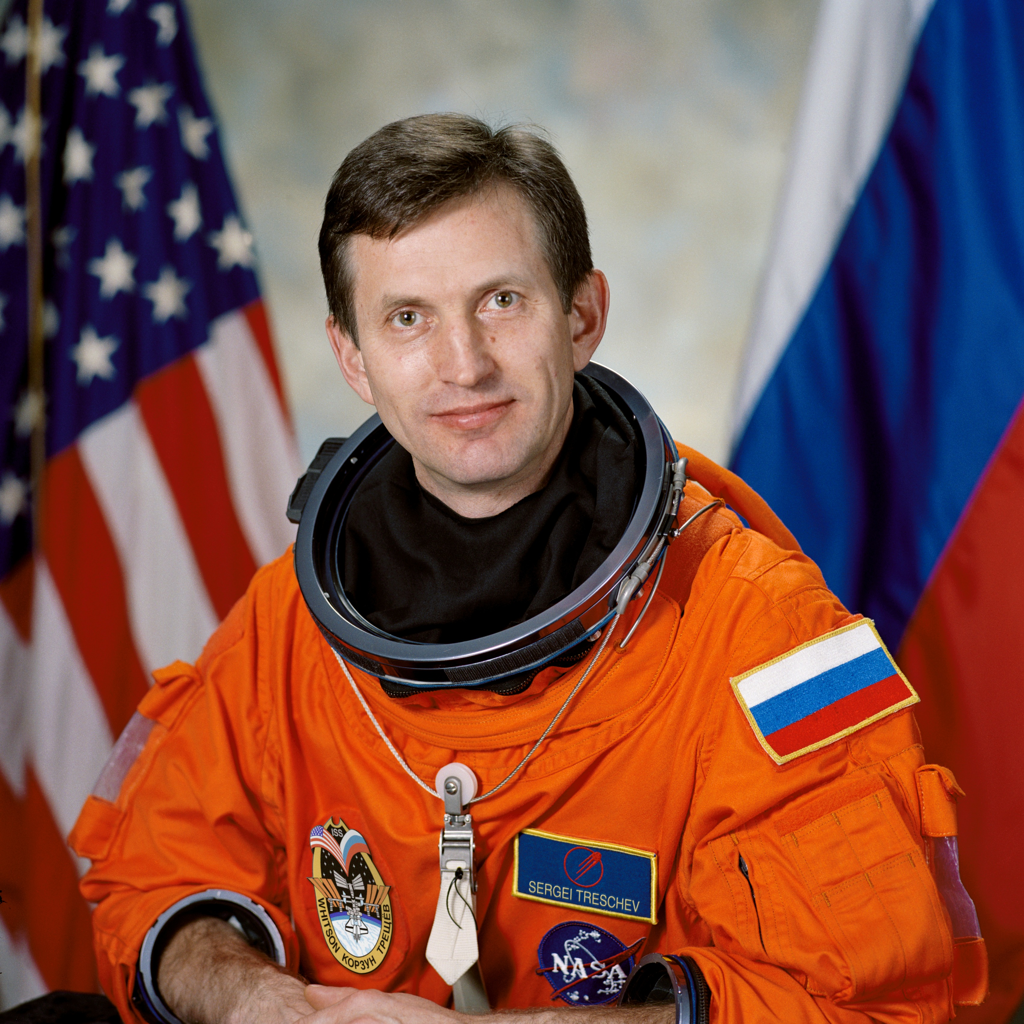 portrait cosmonaut Sergei Treschev